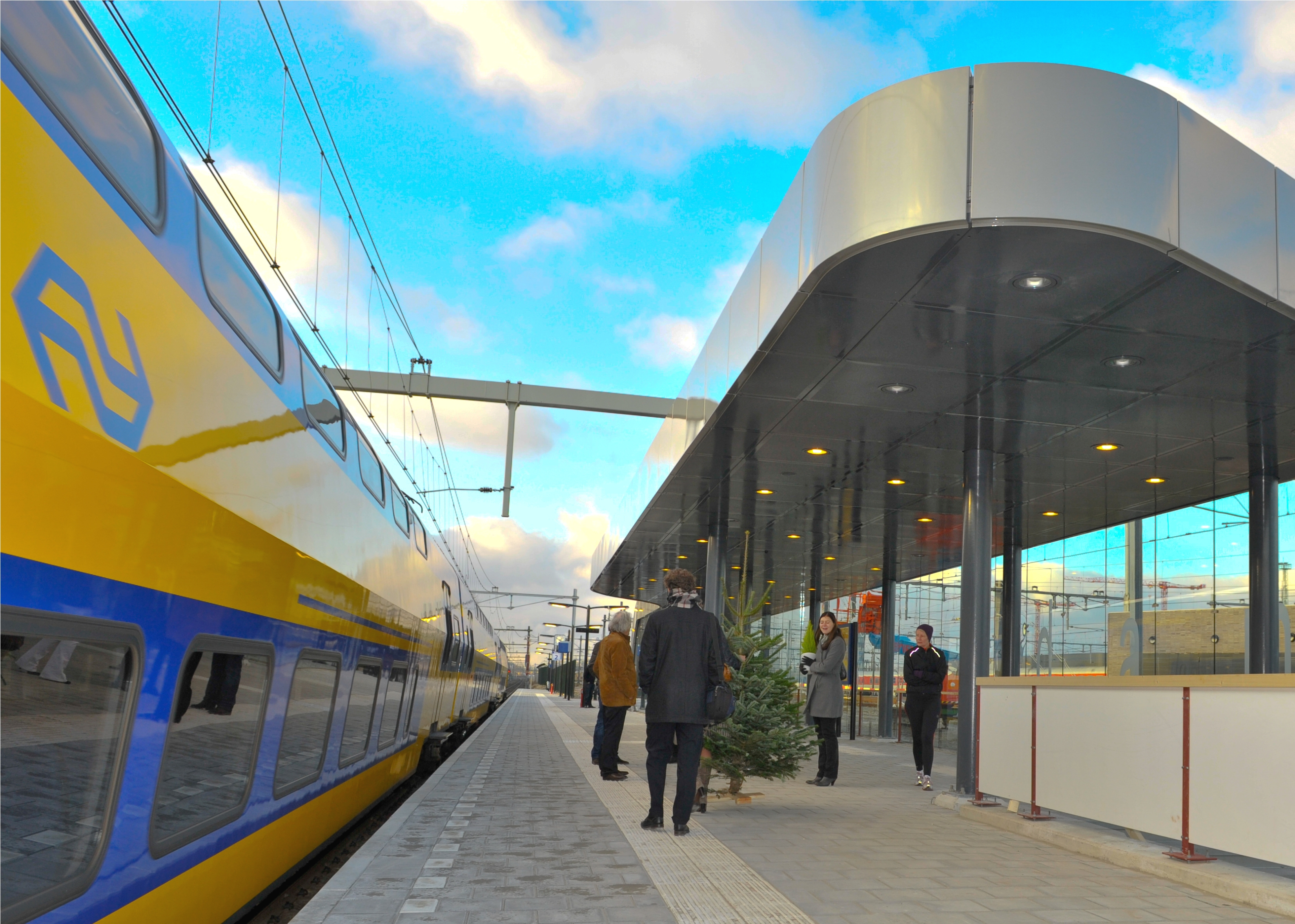 Burgemeester Cohen opende het zondag. Science Park ligt in het oosten van de stad, tussen de stations Amsterdam-Muiderpoort en Diemen. De stoptrein die tussen Amsterdam-Centraal en Almere rijdt, stopt er voortaan. Het treinstation is vernoemd naar de gelijknamige wijk Science Park. Dat is een centrum van exacte wetenschappen; er zitten bedrijven, wetenschapscentra en universiteitsgebouwen. Het nieuwe station moet de wijk beter bereikbaar maken.